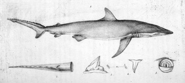 Rycina pochodząca z oryginalnej pracy opisującej Carcharhinus obscurus.